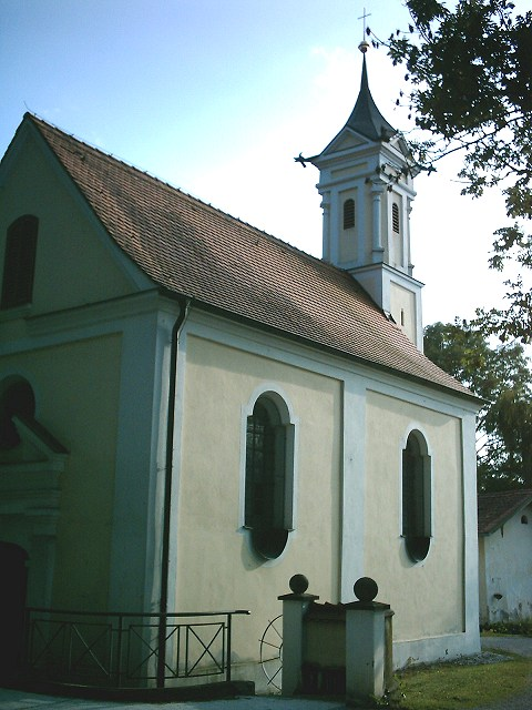 Michaels-Kapelle in Affing, Bayern